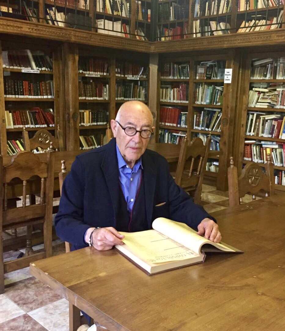 El escritor cántabro en la biblioteca del Círculo de Recreo de Torrelavega (2016).